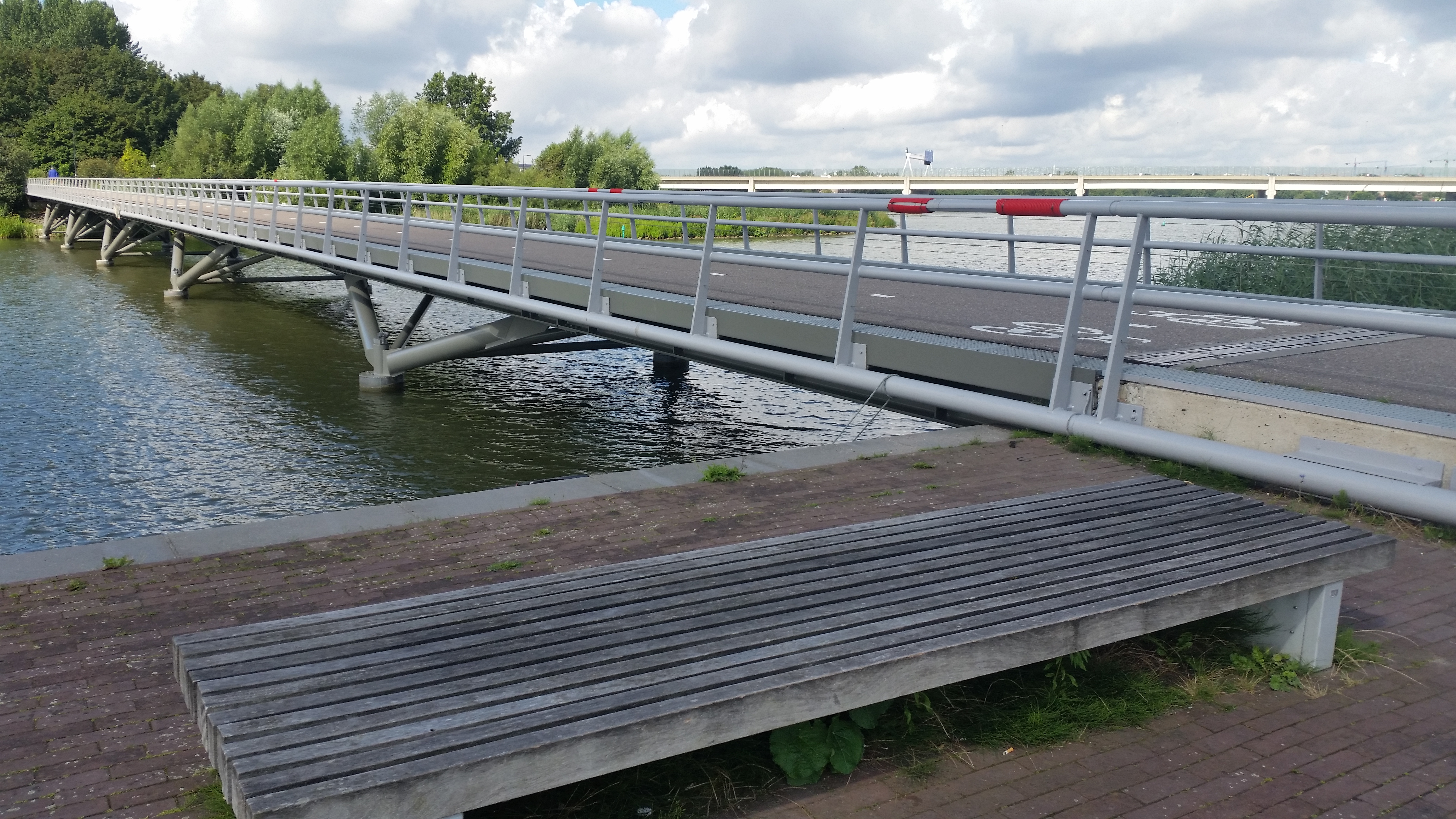 Impressie van brug 2037 Hein de Haanbrug tussen IJburg en Diemerzeedijk (juli 2020)